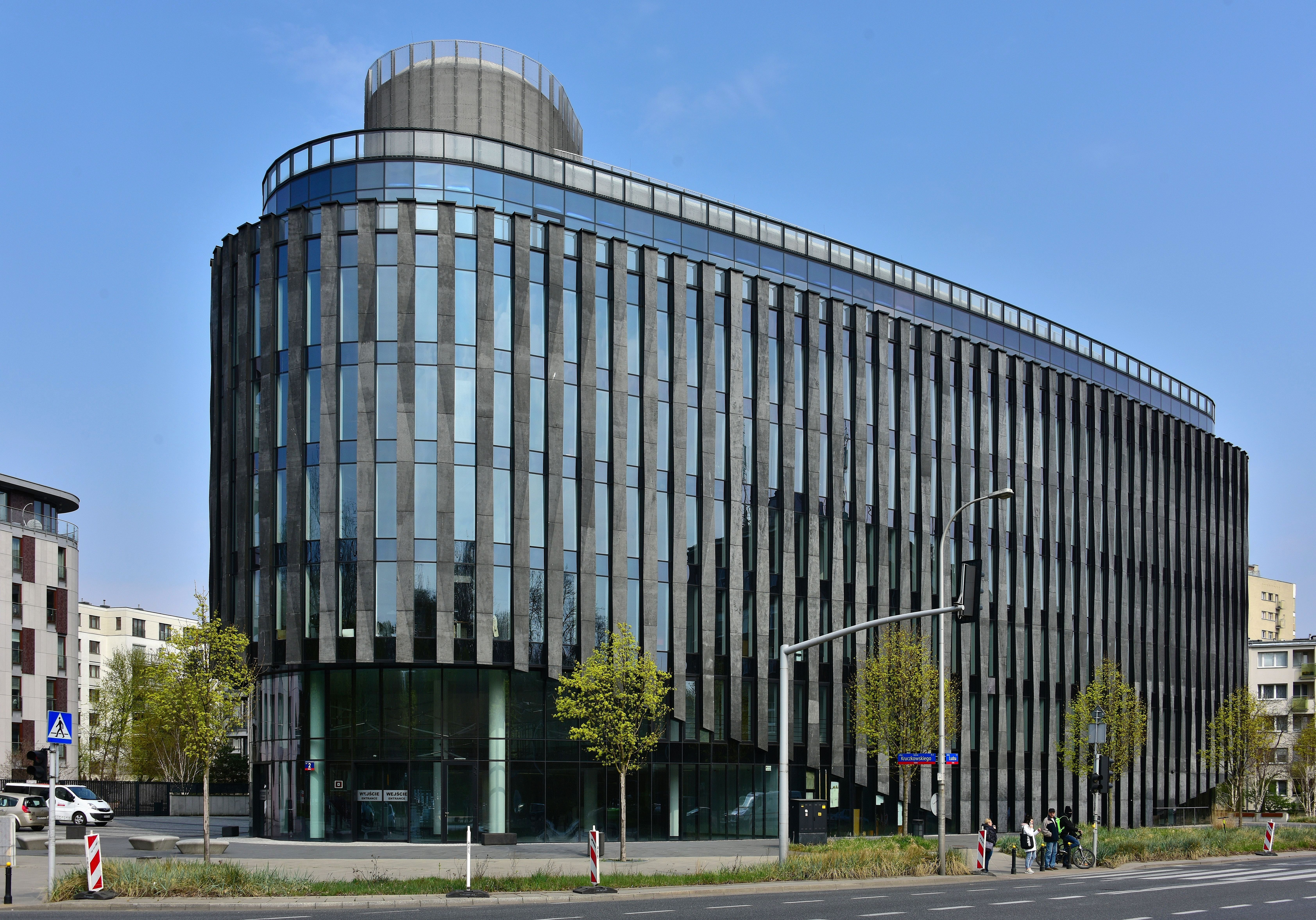 Biurowiec Powiśle Park przy ul. Kruczkowskiego 2 w Warszawie